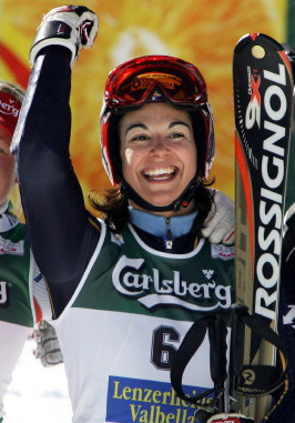 maria_jose_rienda